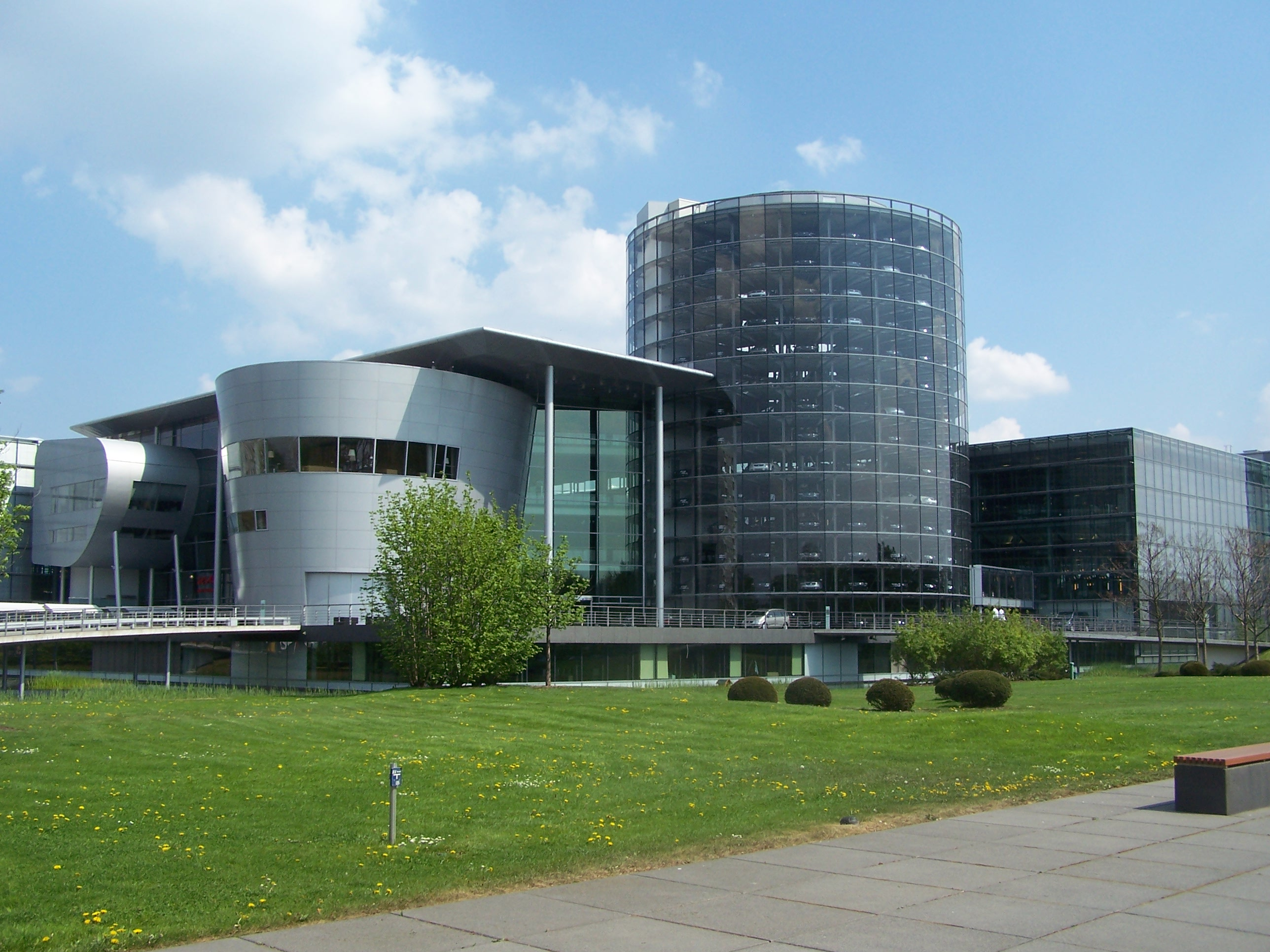 Gläserne Manufaktur in Dresden / Transparent Factory in Dresden, Germany